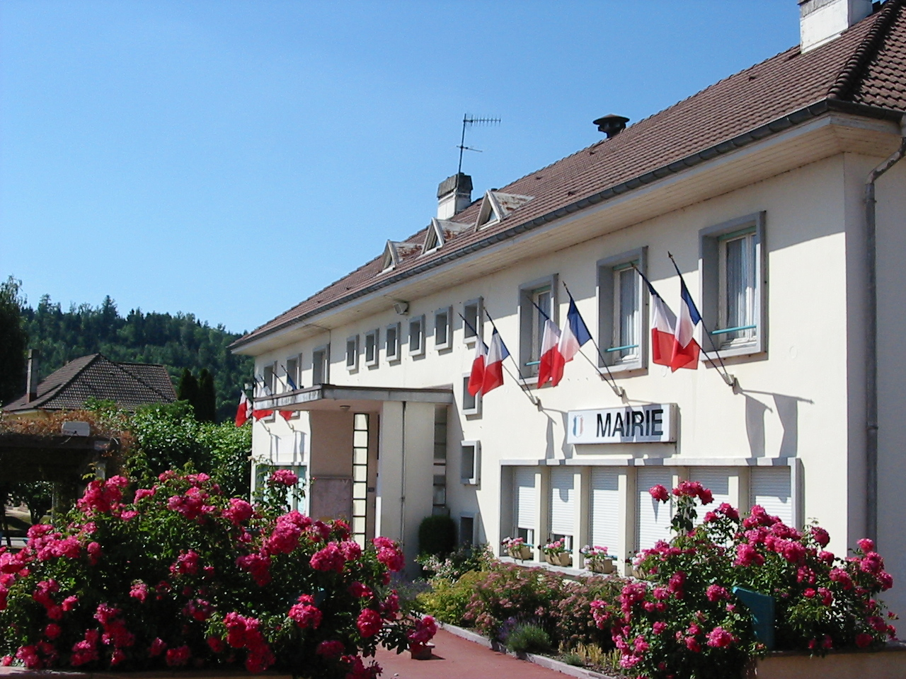 Mairie de Saint-Léonard (Vosges).